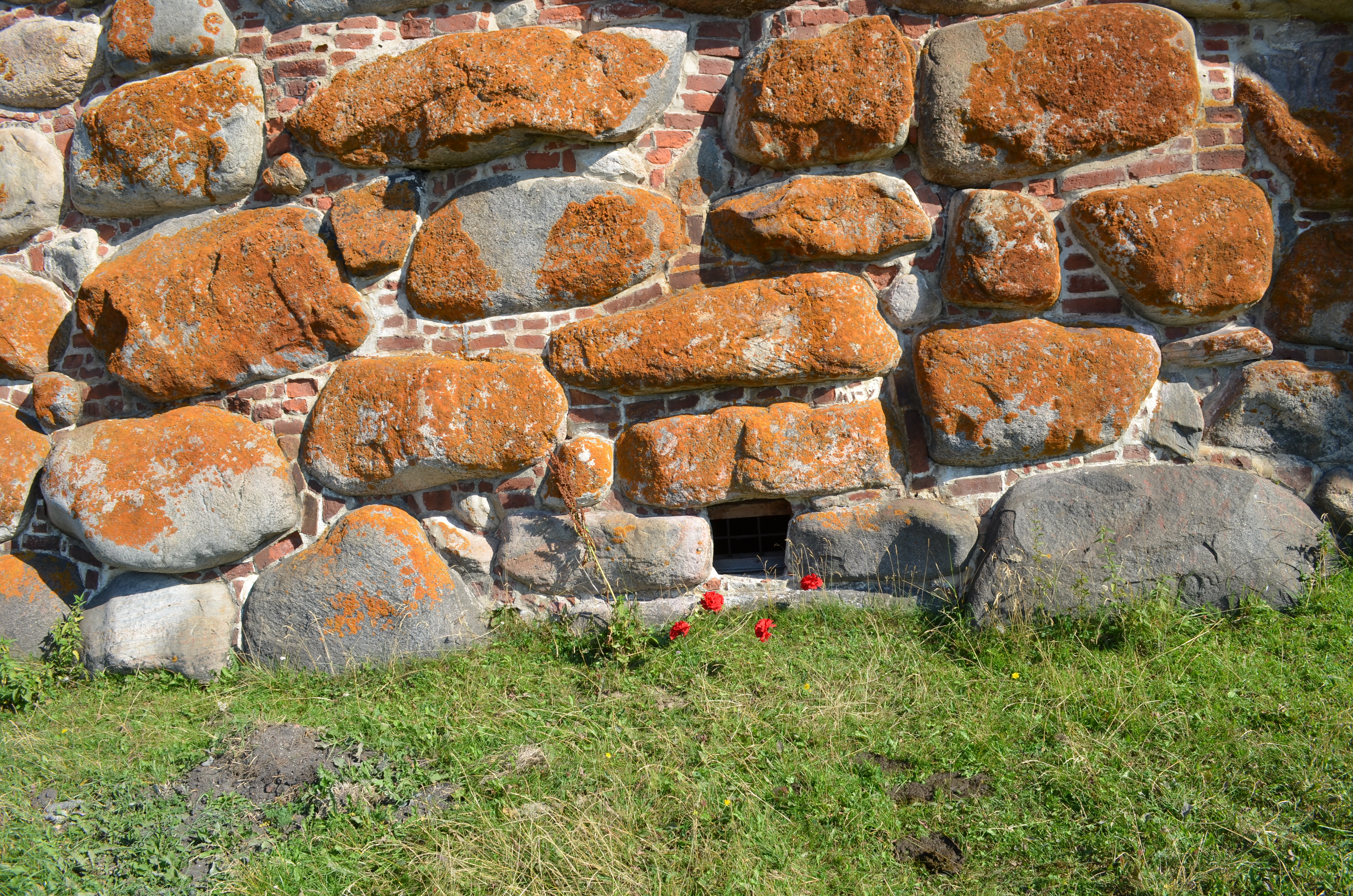 Вікно в’язниці Калнишевського